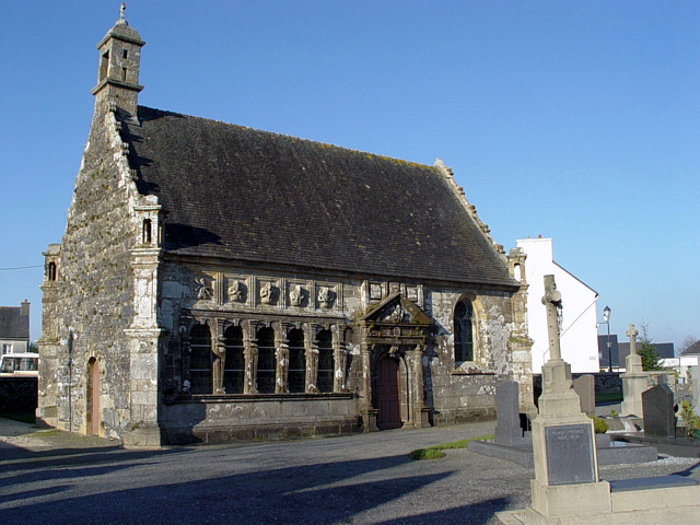 Ploudiry (Bretagne, Finistère): Beinhaus.